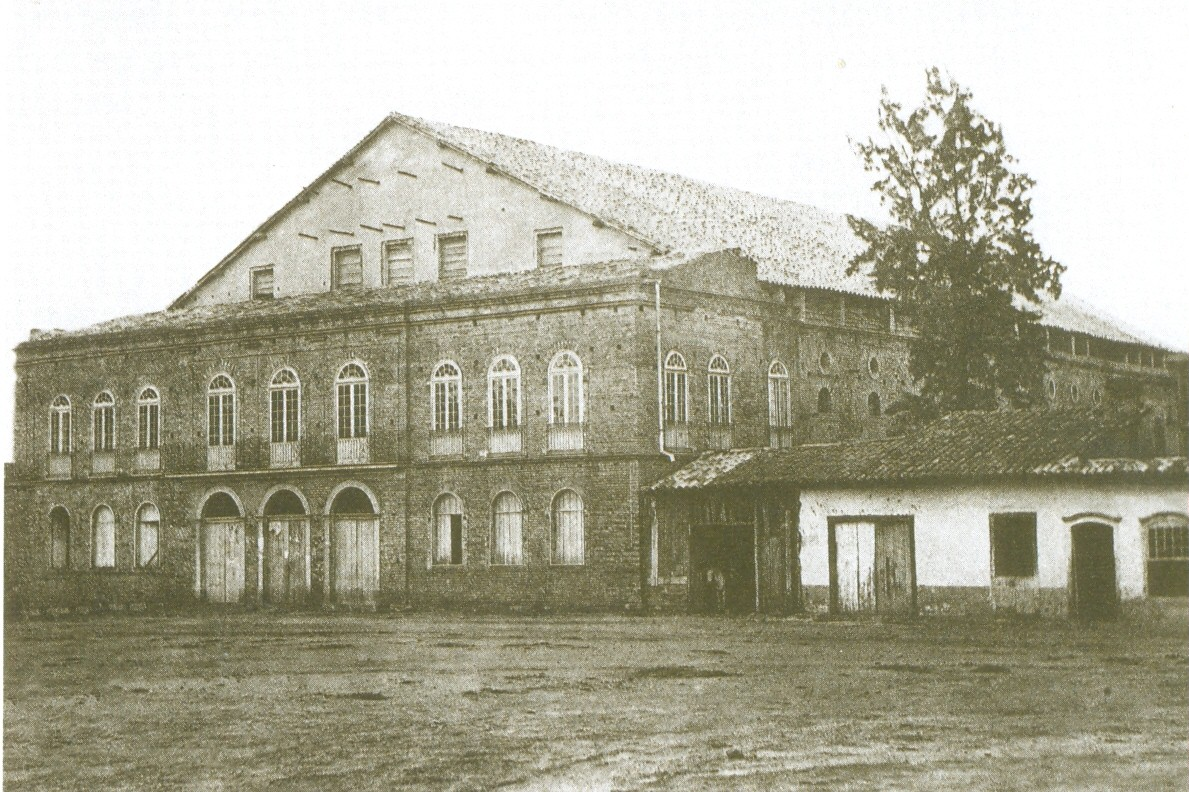 Foto do Theatro São José ainda inacabado em 1862